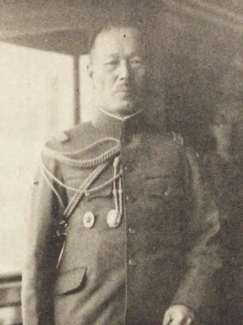 川岸文三郎